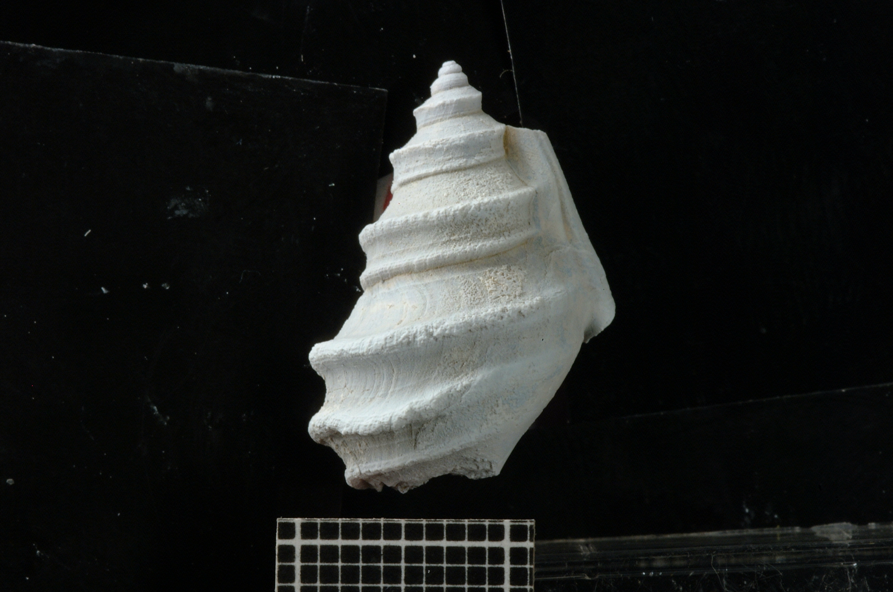 Ejemplar del gastrópodo fósil Protohemichenopus neuquensis. Formación Agrio. Cuenca Neuquina. Antigüedad: Hauteriviano.